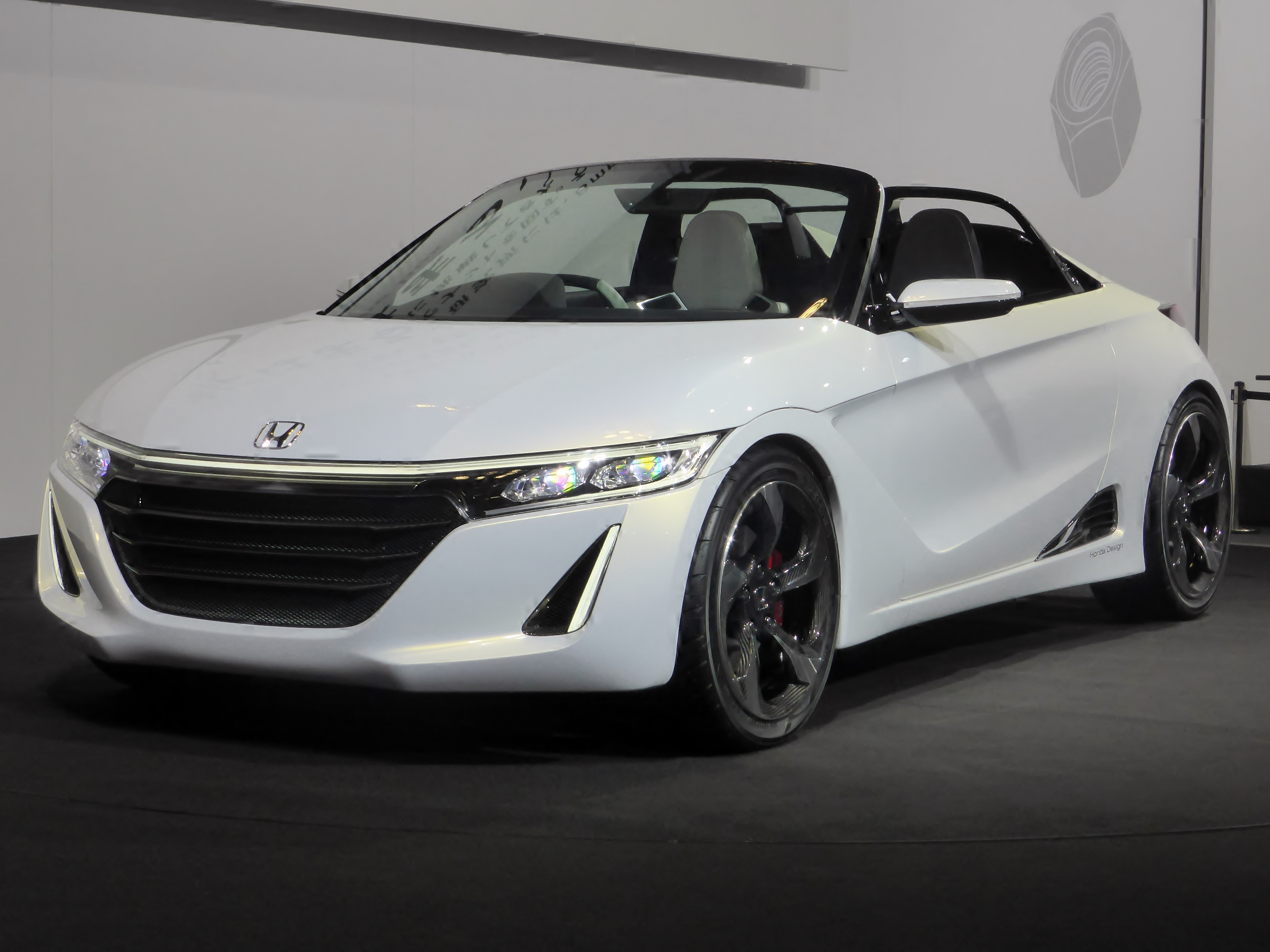 大阪モーターショー2013のホンダブースにおいてS660コンセプトを撮影。